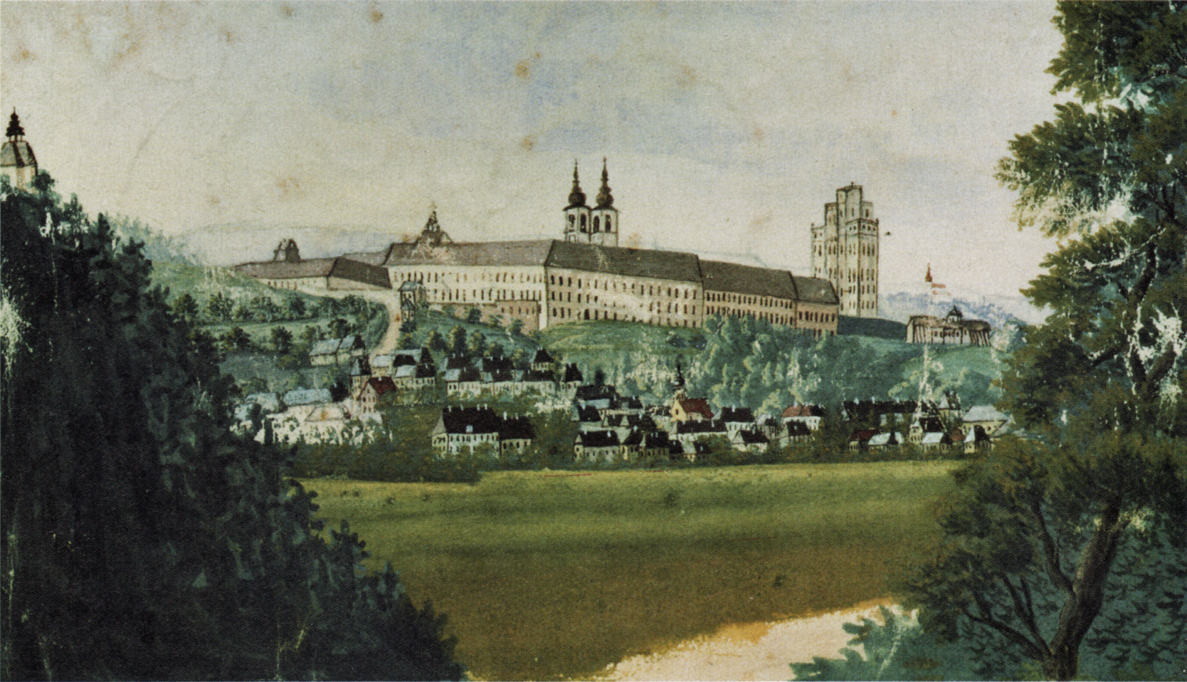 Adalbert Stifter malte diese Ansicht von Kremsmünster während seiner Zeit als Lateinschüler